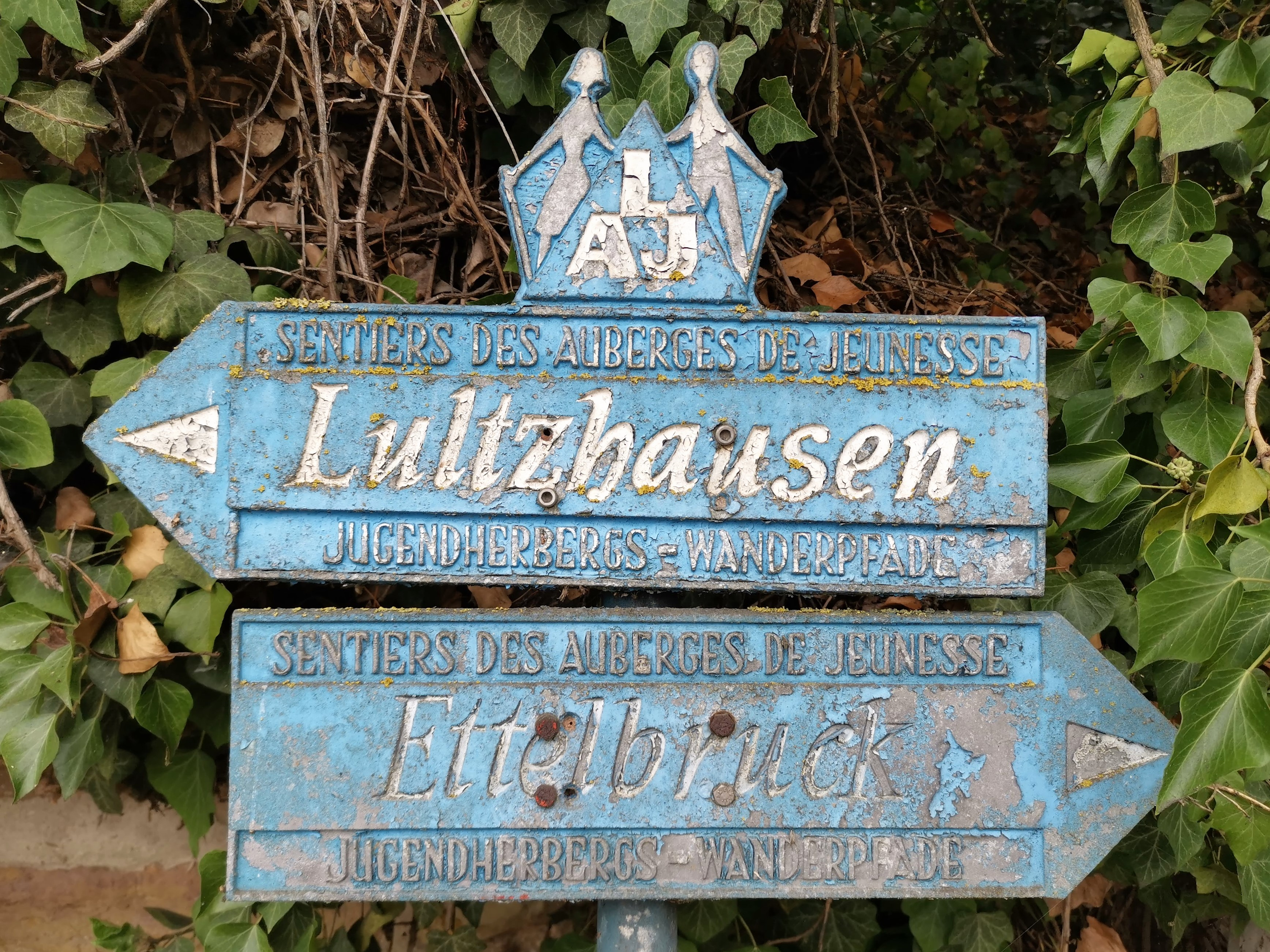 Balise (historique) du sentier pédestre des auberges de jeunesse Lultzhausen-Ettelbruck